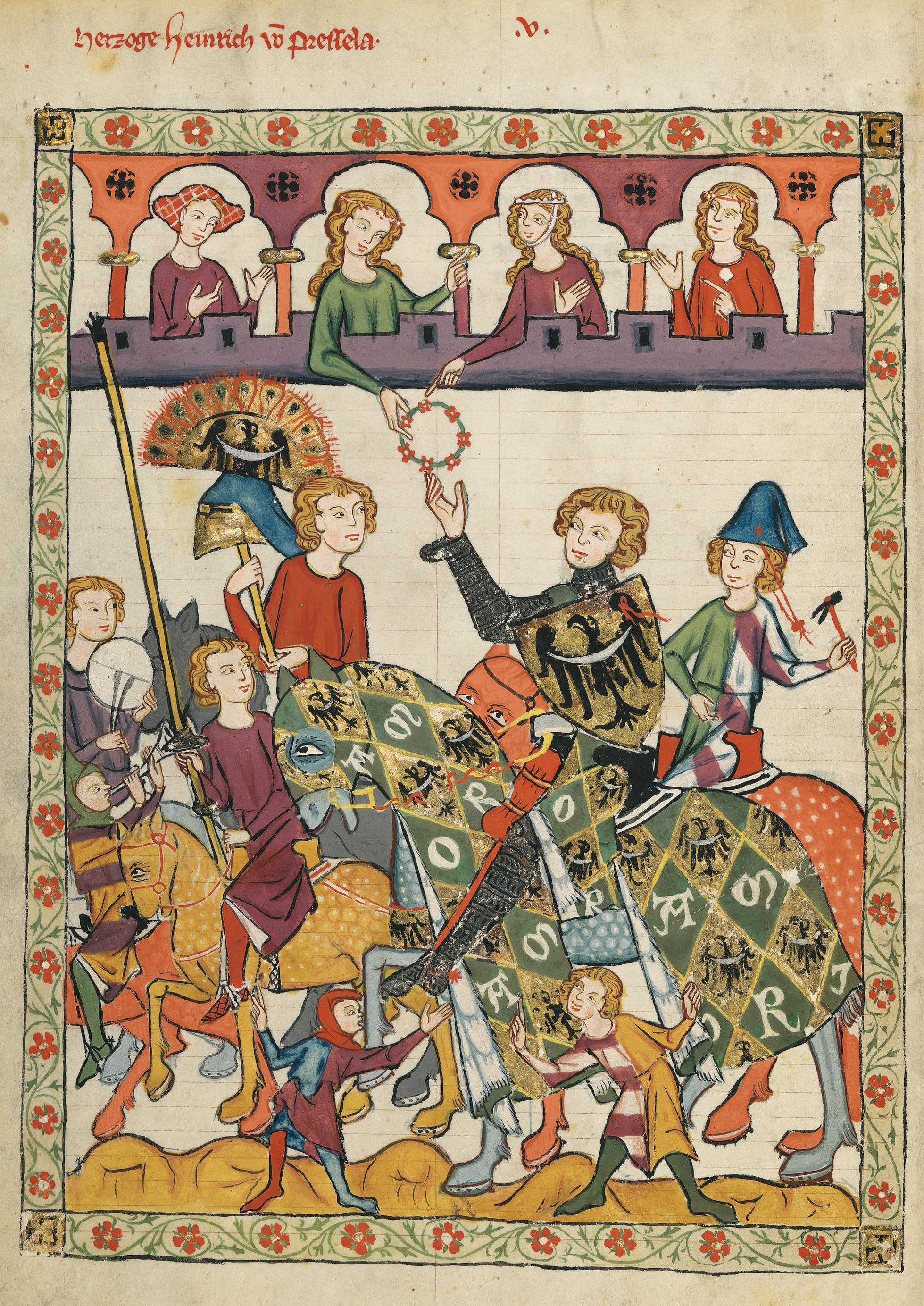 Codex Manesse, fol. 11v, Herzog Heinrich von Breslau (wahrscheinlich Heinrich IV. von Schlesien)